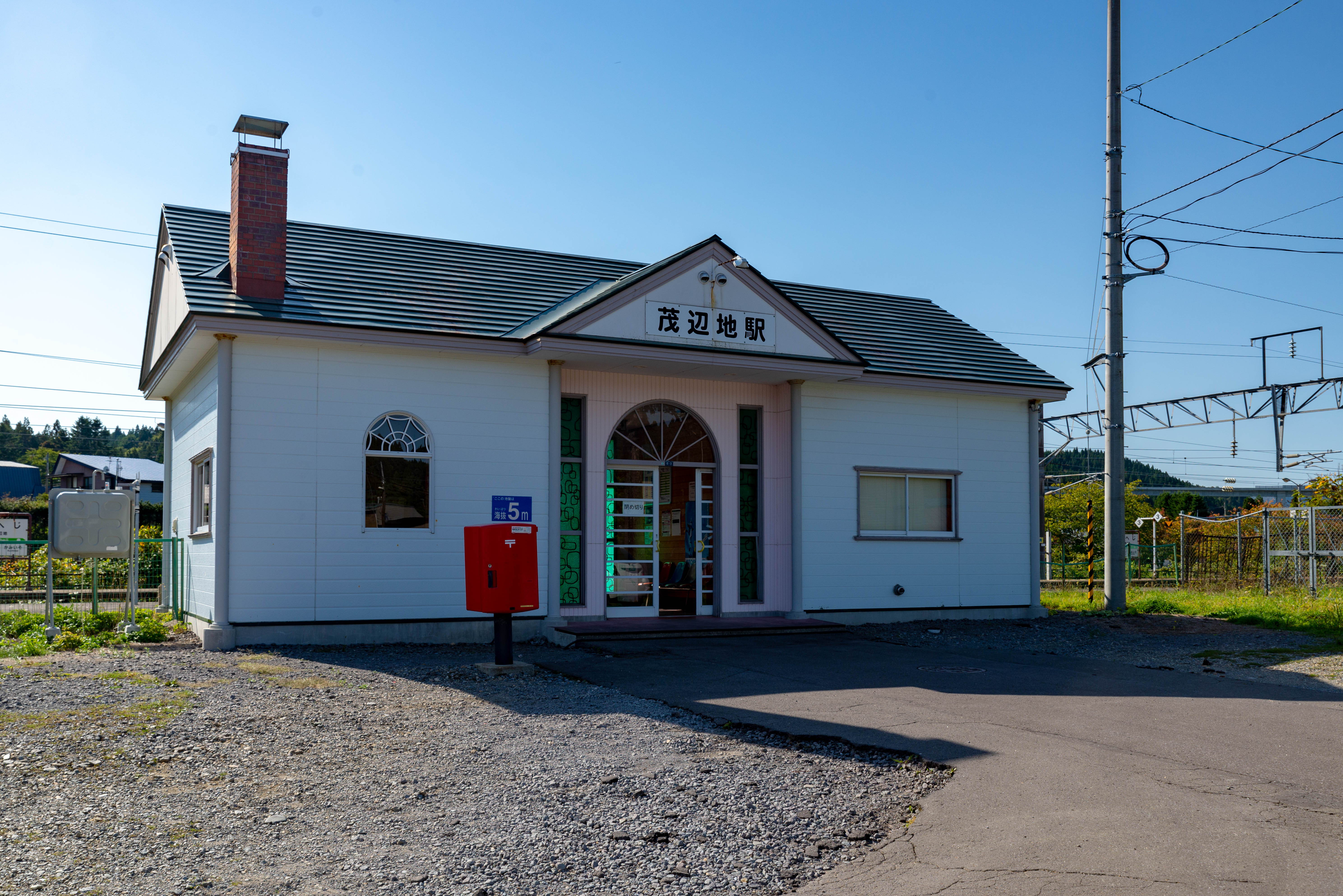 道南いさりび鉄道株式会社茂辺地駅駅舎 （北海道旅客鉄道株式会社江差線茂辺地駅駅舎）